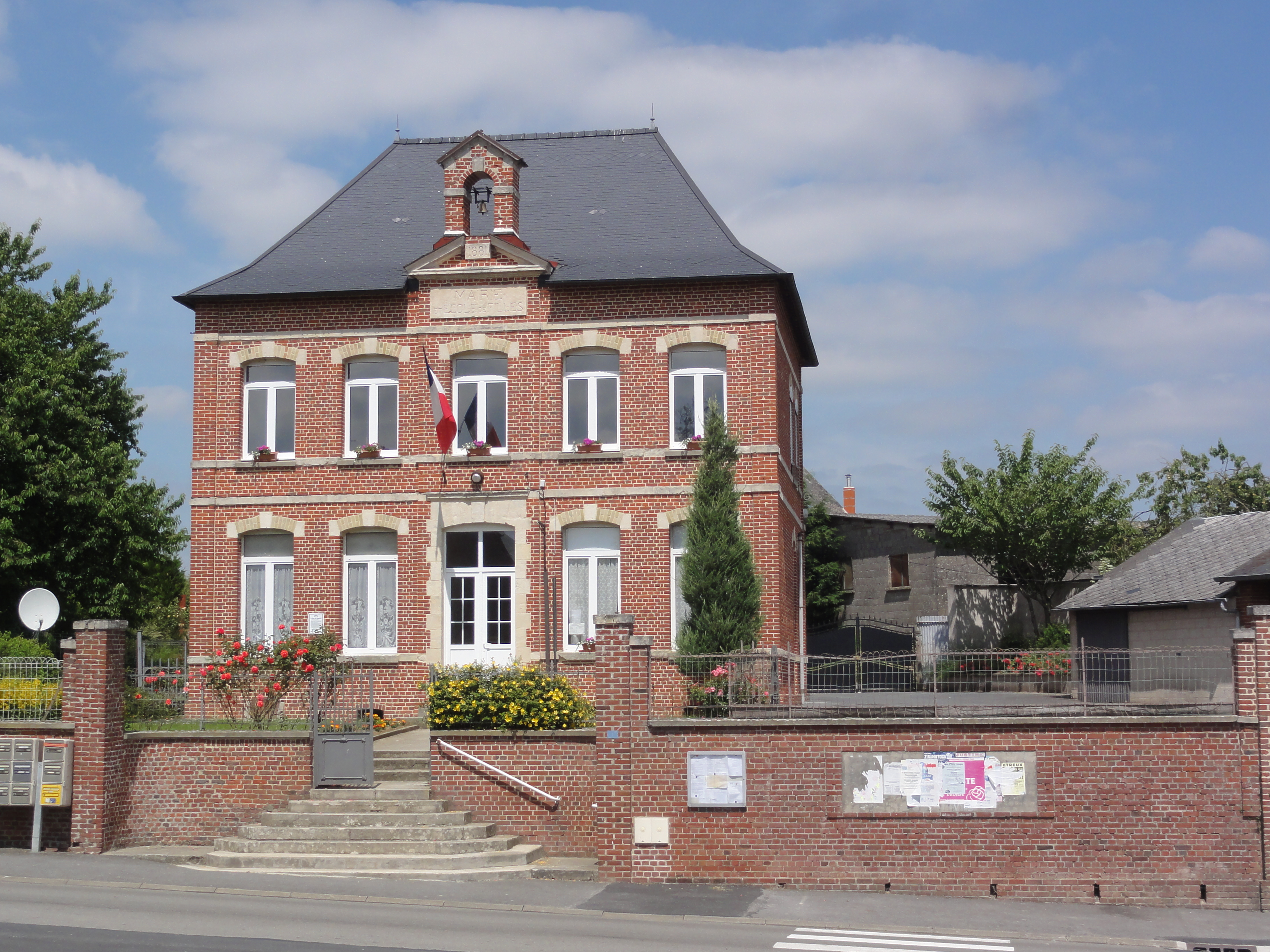 Dorengt (Aisne) mairie